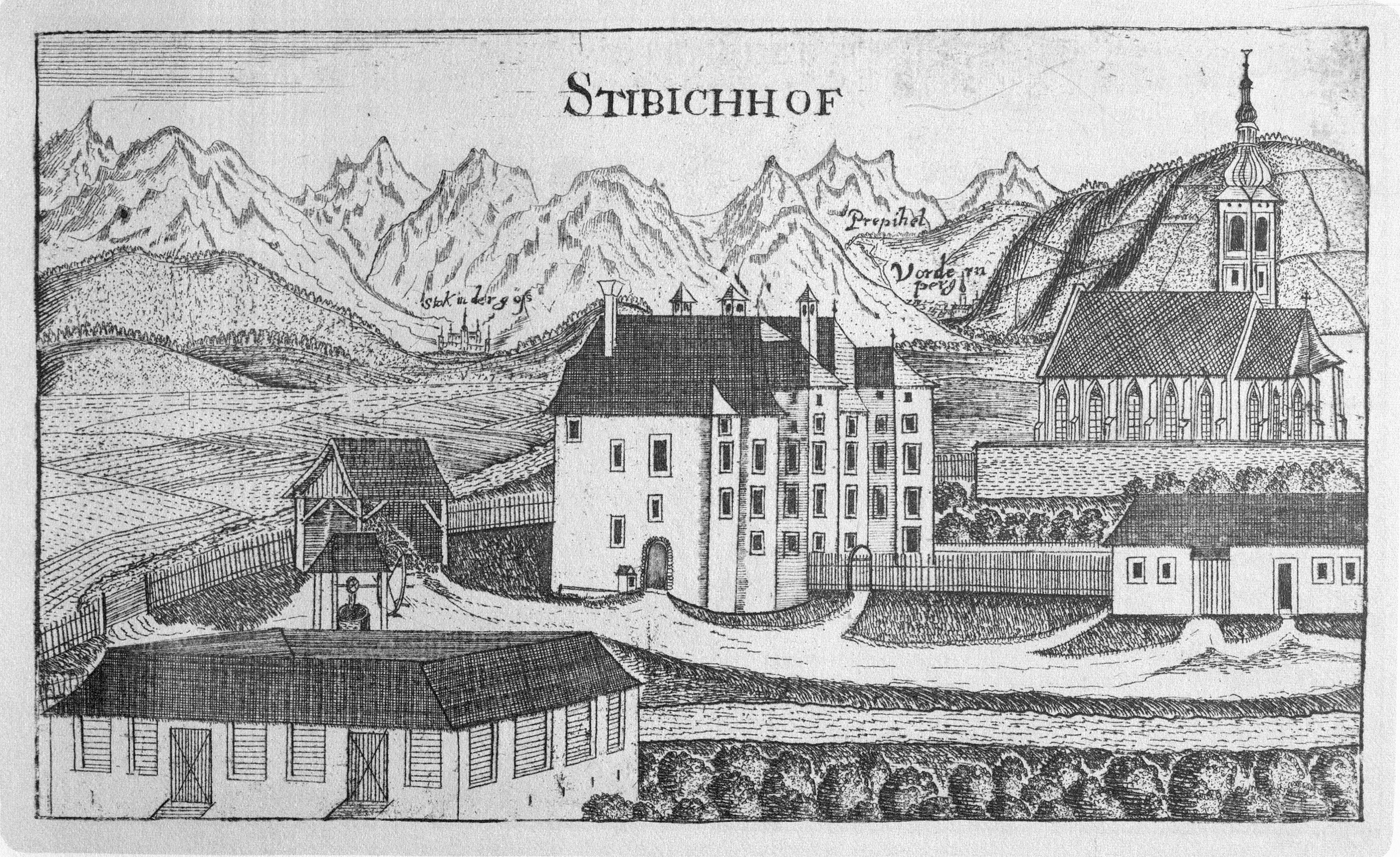 G. M. Vischers Käyserlichen Geographi, Topographia Ducatus Stiriae, Das ist: Eigentliche Delineation / und Abbildung aller Städte / Schlösser / Marcktfleck / Lustgärten / Probsteyen / Stiffter / Clöster und Kirchen / so es sich im Herzogthumb Steyrmarck befinden; Und anjetzo Umb einen billichen Preyß zu finden seynd Bey Johann Bitsch Universitäts Buchhandlern / Auff dem Juden=Platz bey der guldenen Saulen. Graz 1681 Die Nummerierung der Dateien folgt der alphabetischen Reihung der Ortsnamen und entspricht nicht dem Vischer-Register